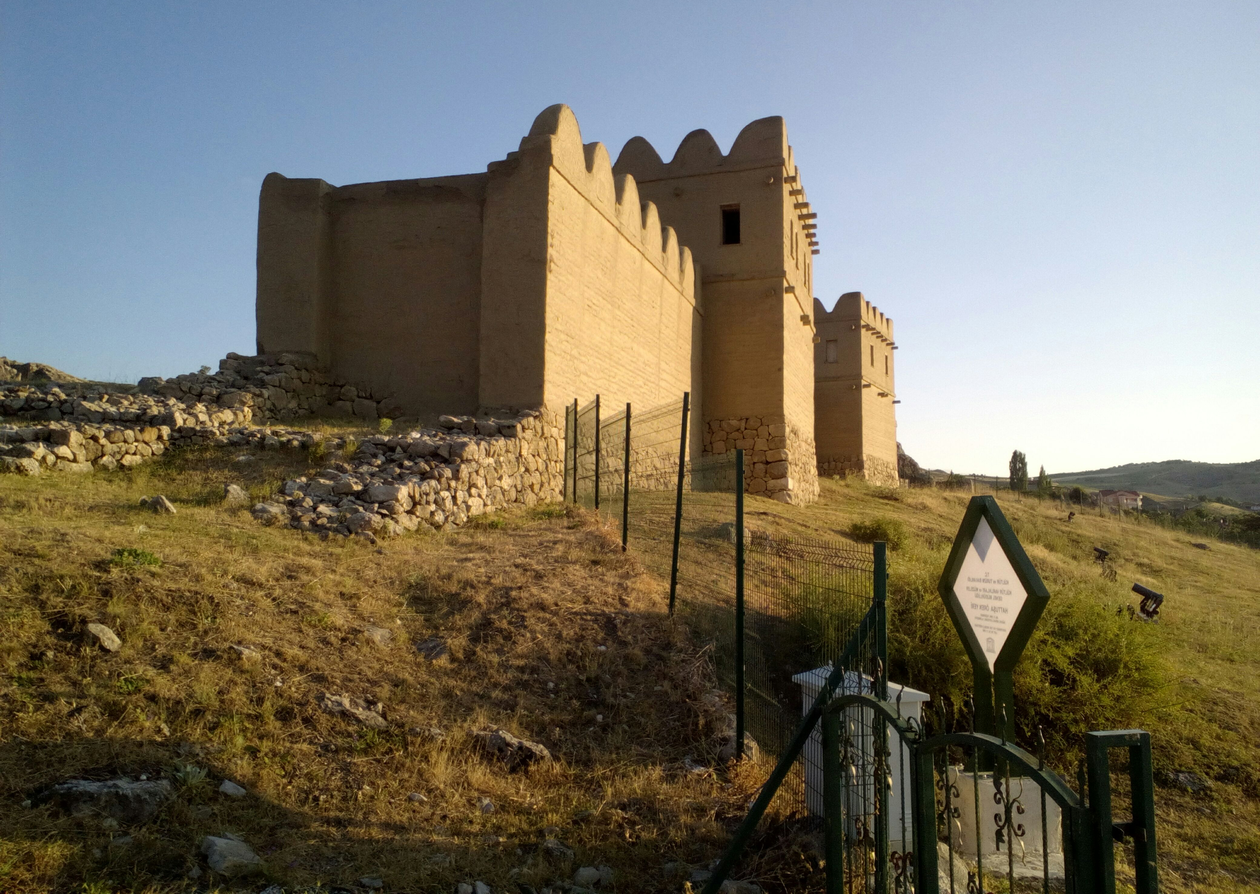 Hattuszasz rekonstruált fala az egykori városkapu felől. Az előtérben az újjáépítés előtti állapotú torony falai (Hattuszasz, Boğazkale, Törökország)